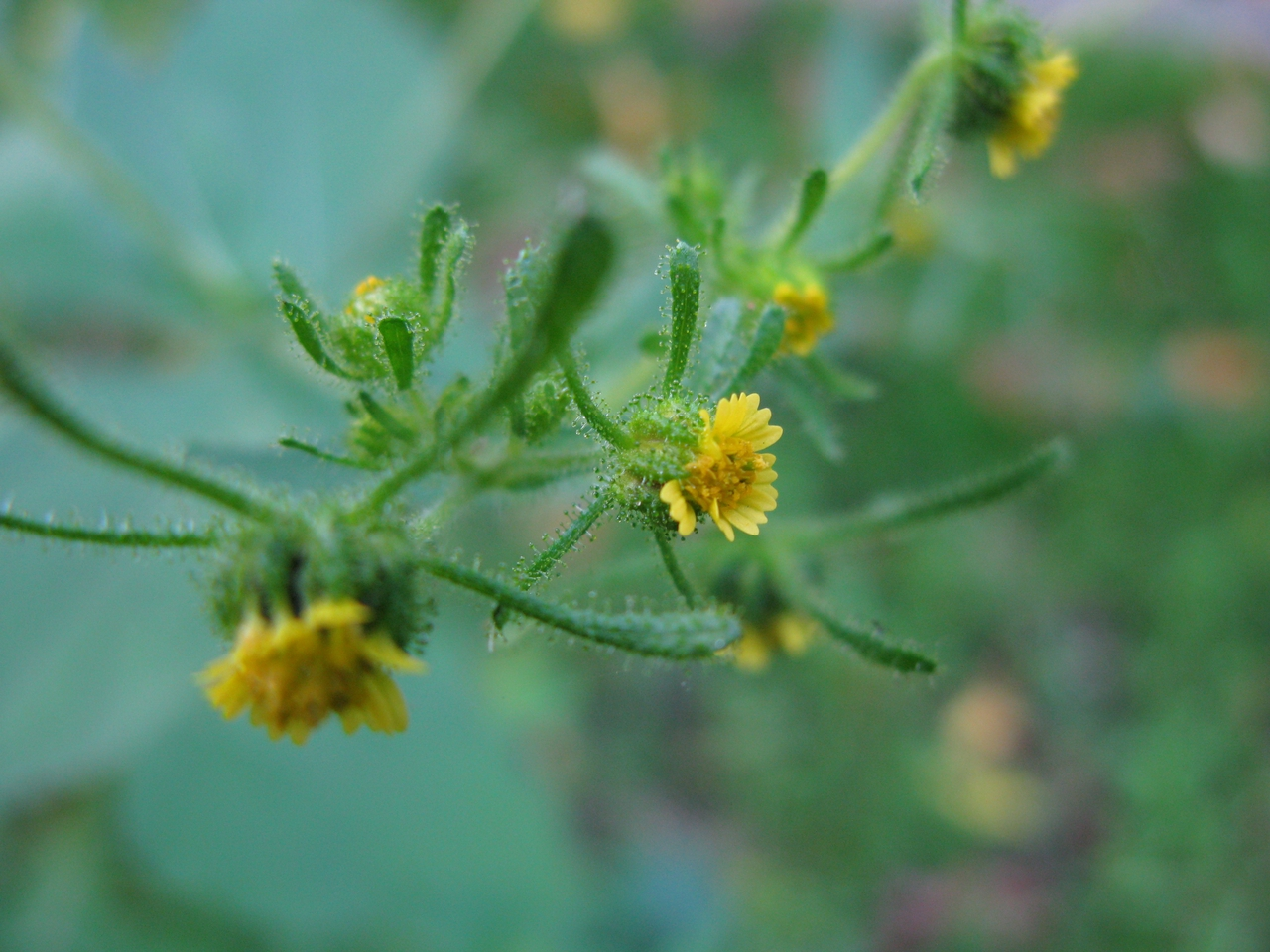 german neophyte Sigesbeckia serrata